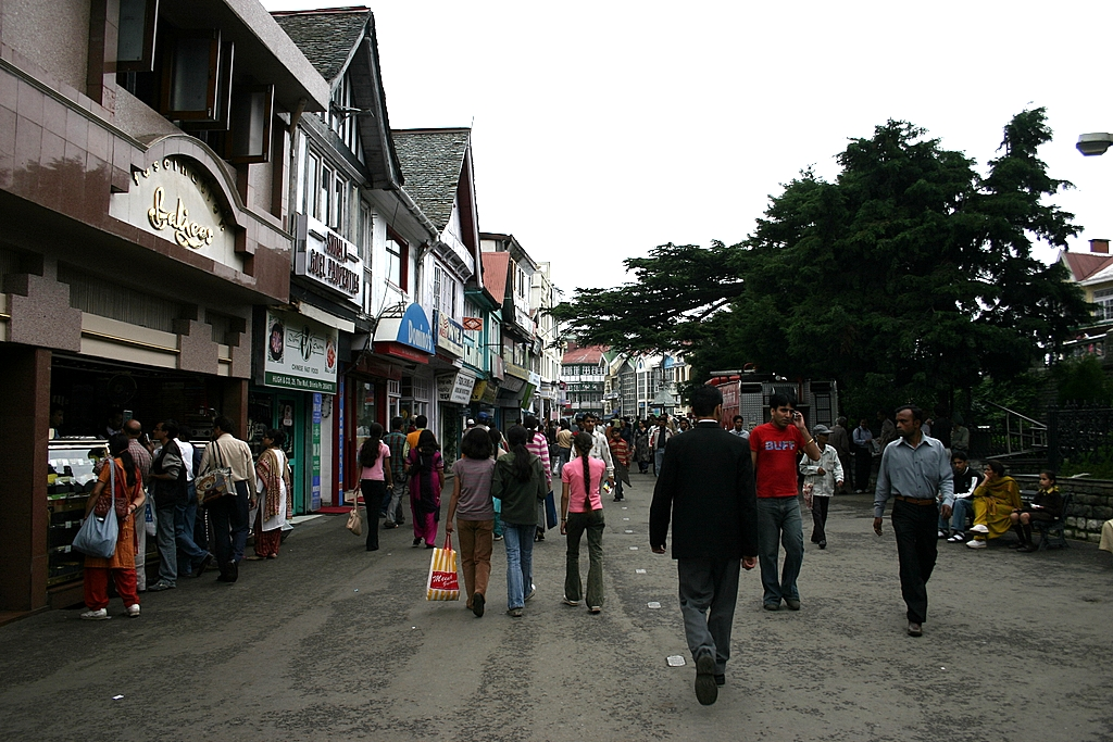 Mall Road, Shimla, HP, India